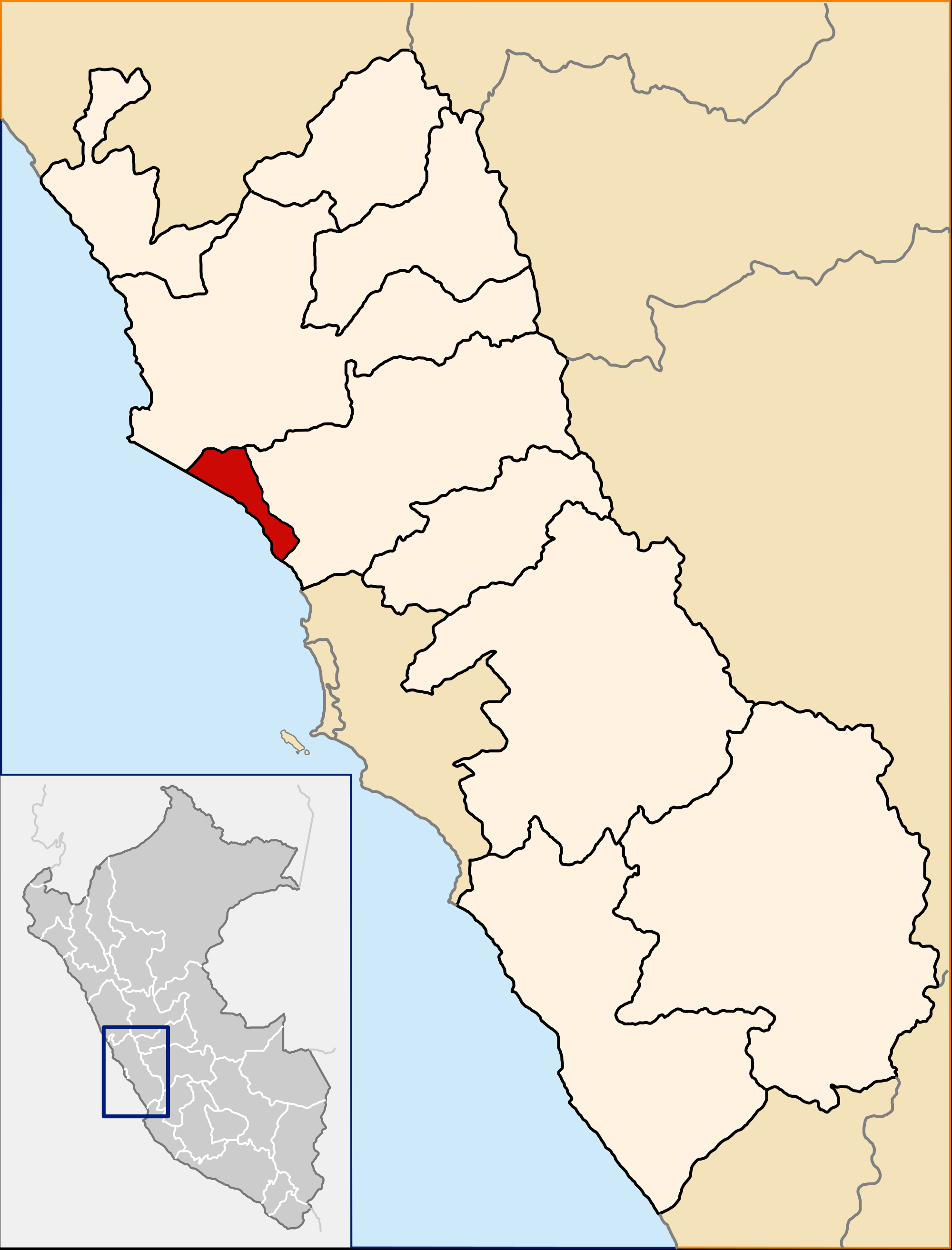 Ubicación del distrito de chancay